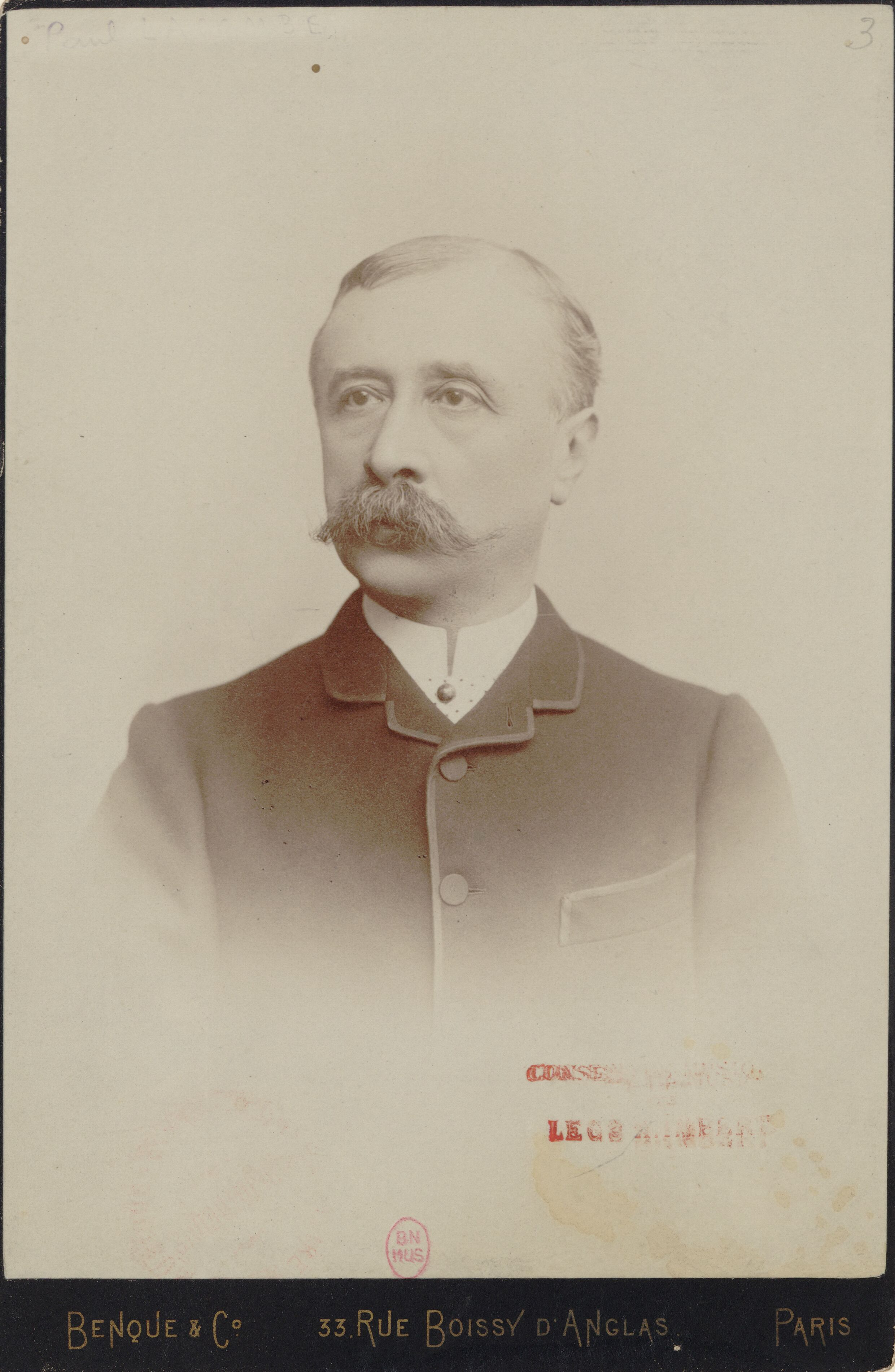 Paul Lacombe (1837-1827)